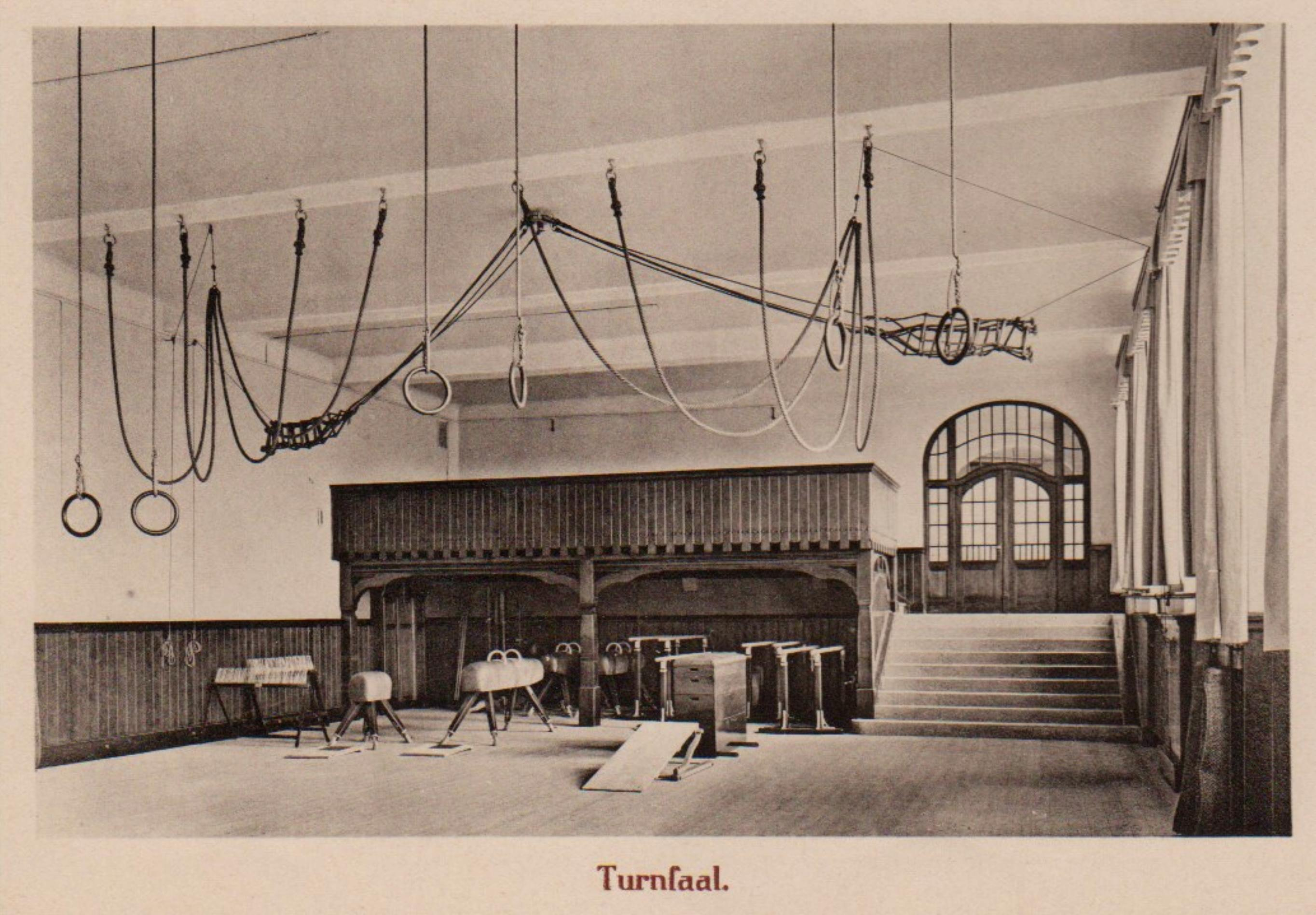 Dresden, Königliches Lehrerseminar Dresden-Strehlen (nach Wiederaufbau TU-Gebäude am Weberplatz) – Turnsaal 1910